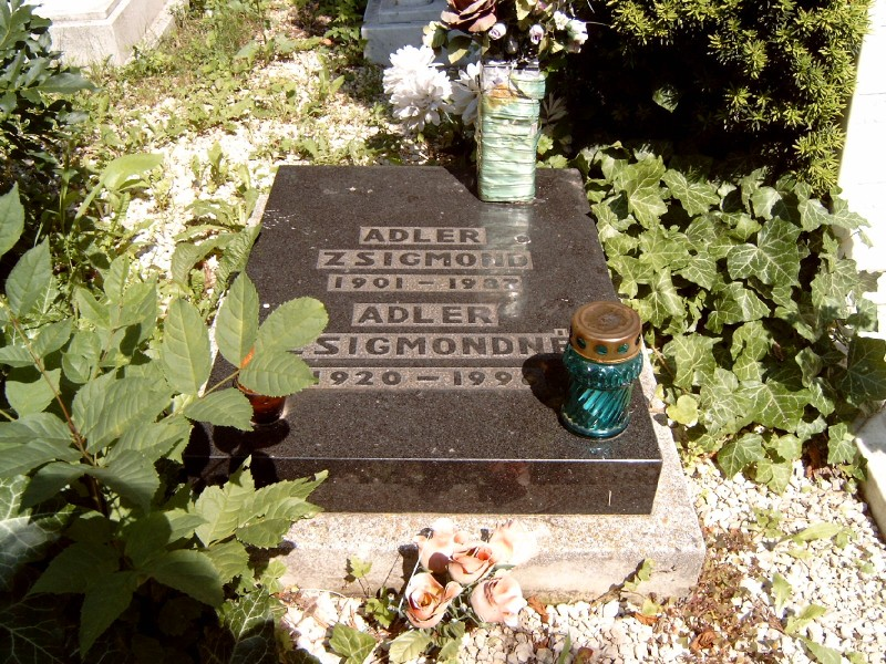 Adler Zsigmond és feleségének sírja a budapesti Farkasréti temetőben.